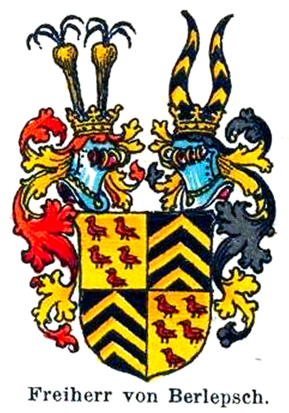 Wappen derer von Berlepsch